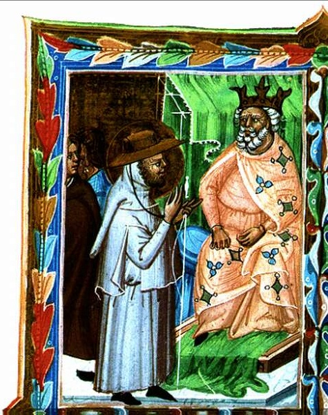 Sagredo u Štěpána I. NOTE: This picture has been very badly digitally colour-adjusted, in the false presumption that the background should be white. The background is parchment. It would be fawn or dark cream in colour, NOT white. This adjustment has made every colour wrong. This file should not be used to demonstrate what this picture looks like.